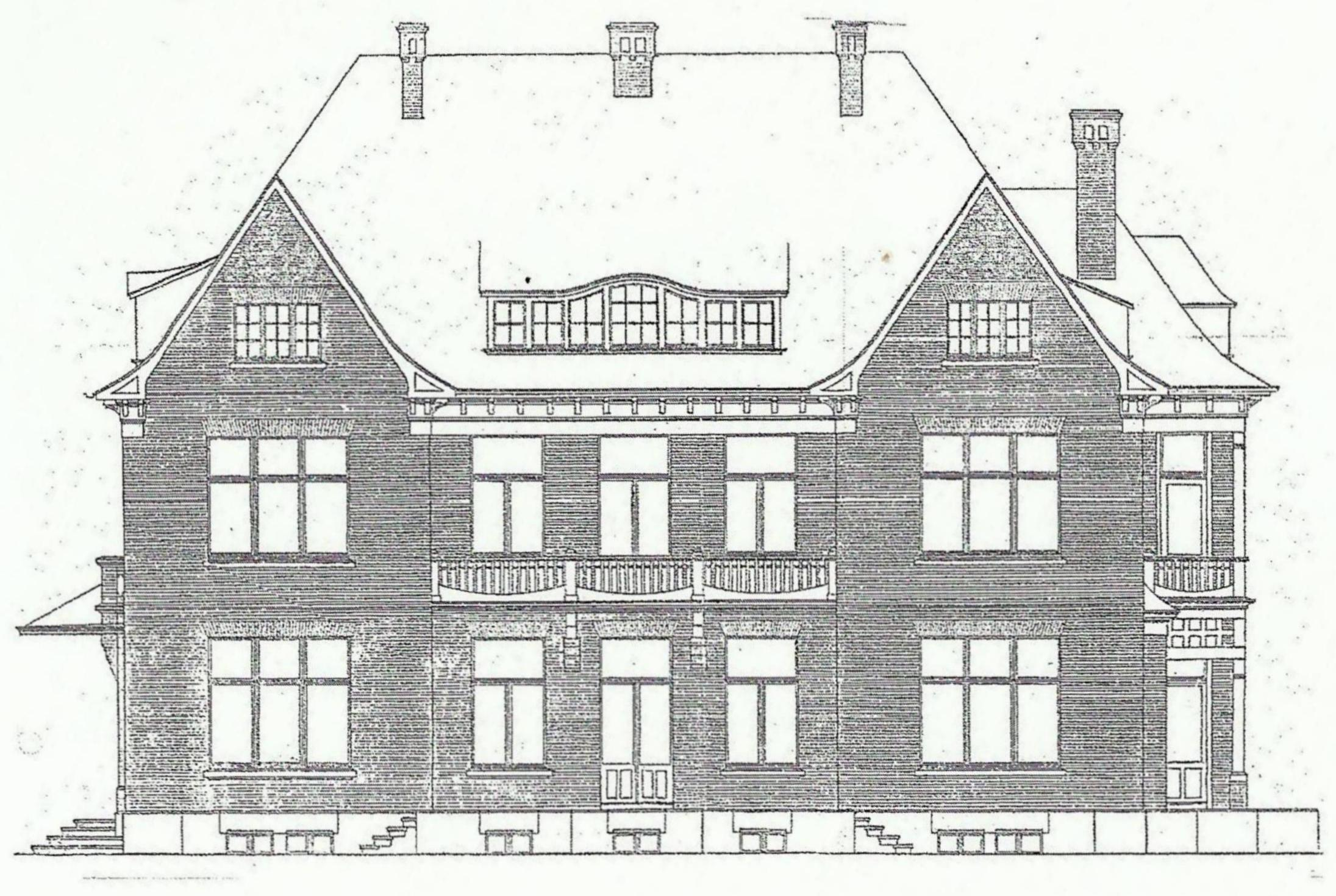 Villa Bülbring, Raiffeisenstraße 1, Bonn-Gronau: Aufriss der Vorderfront bzw. südlichen Seitenfront (zur Raiffeisenstraße)